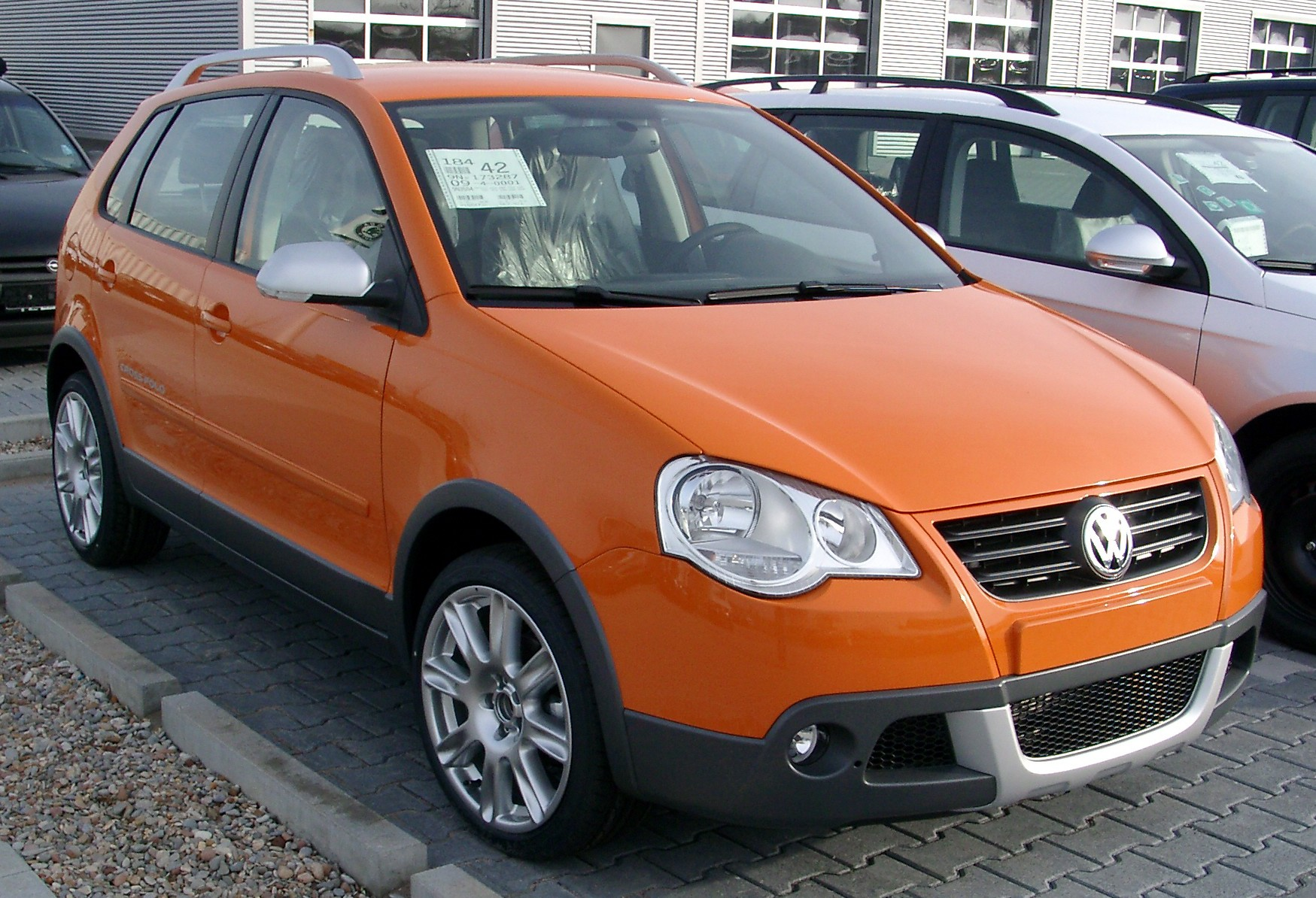 VW Polo IV CrossPolo